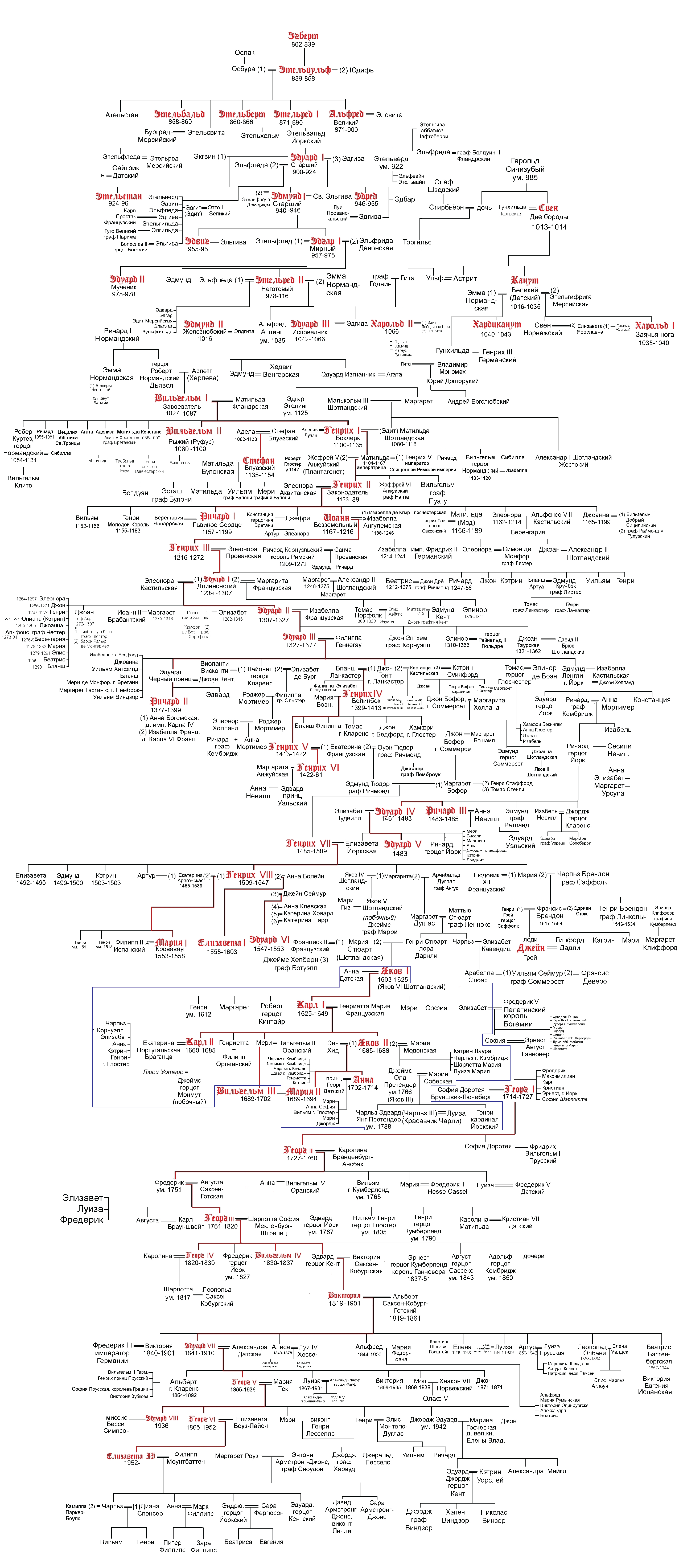 место Стюартов в общем родословии